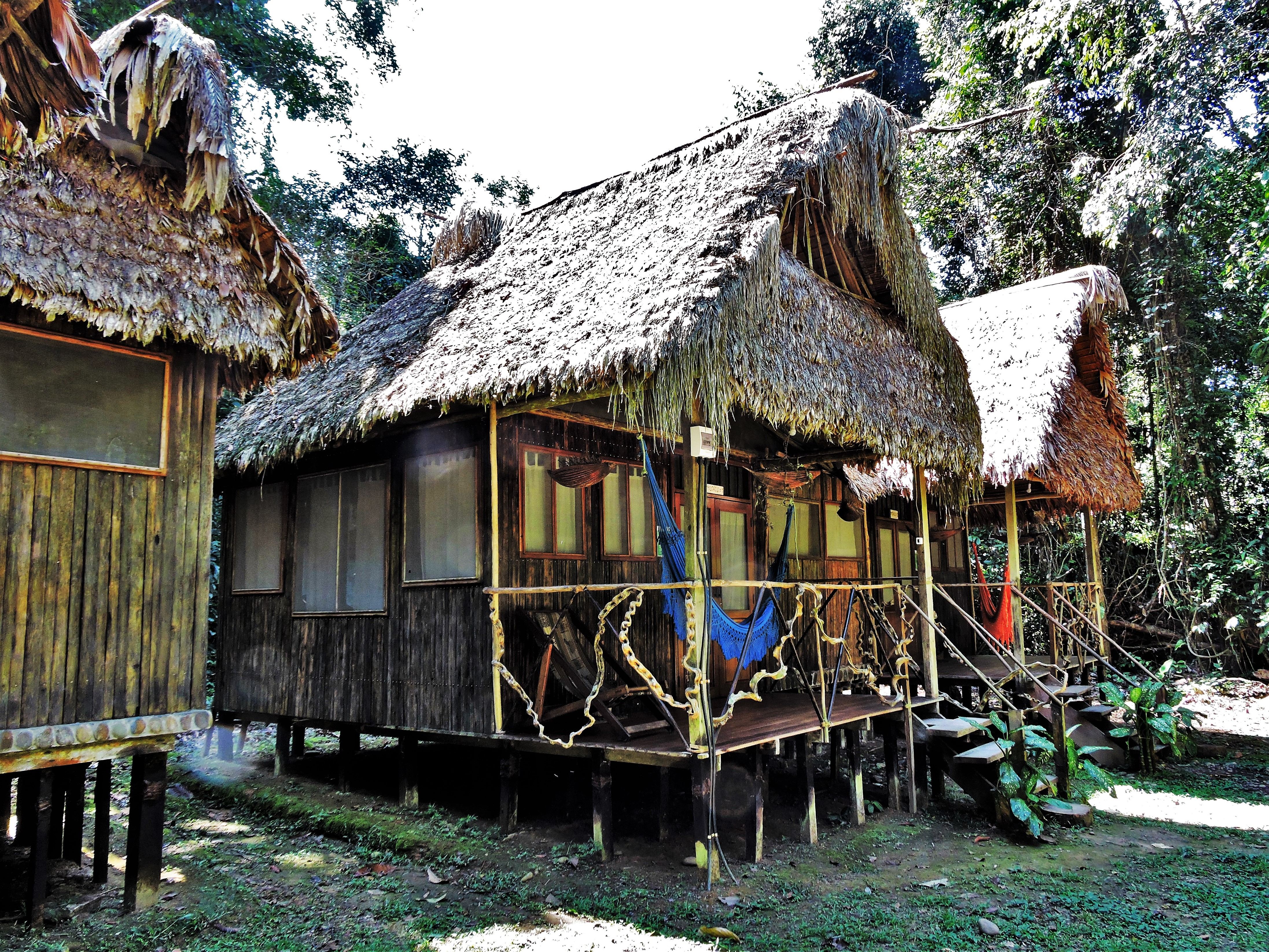 Cabañas en Chalalan Albergue Ecológico, en el Parque Nacional Madidi, Bolivia.